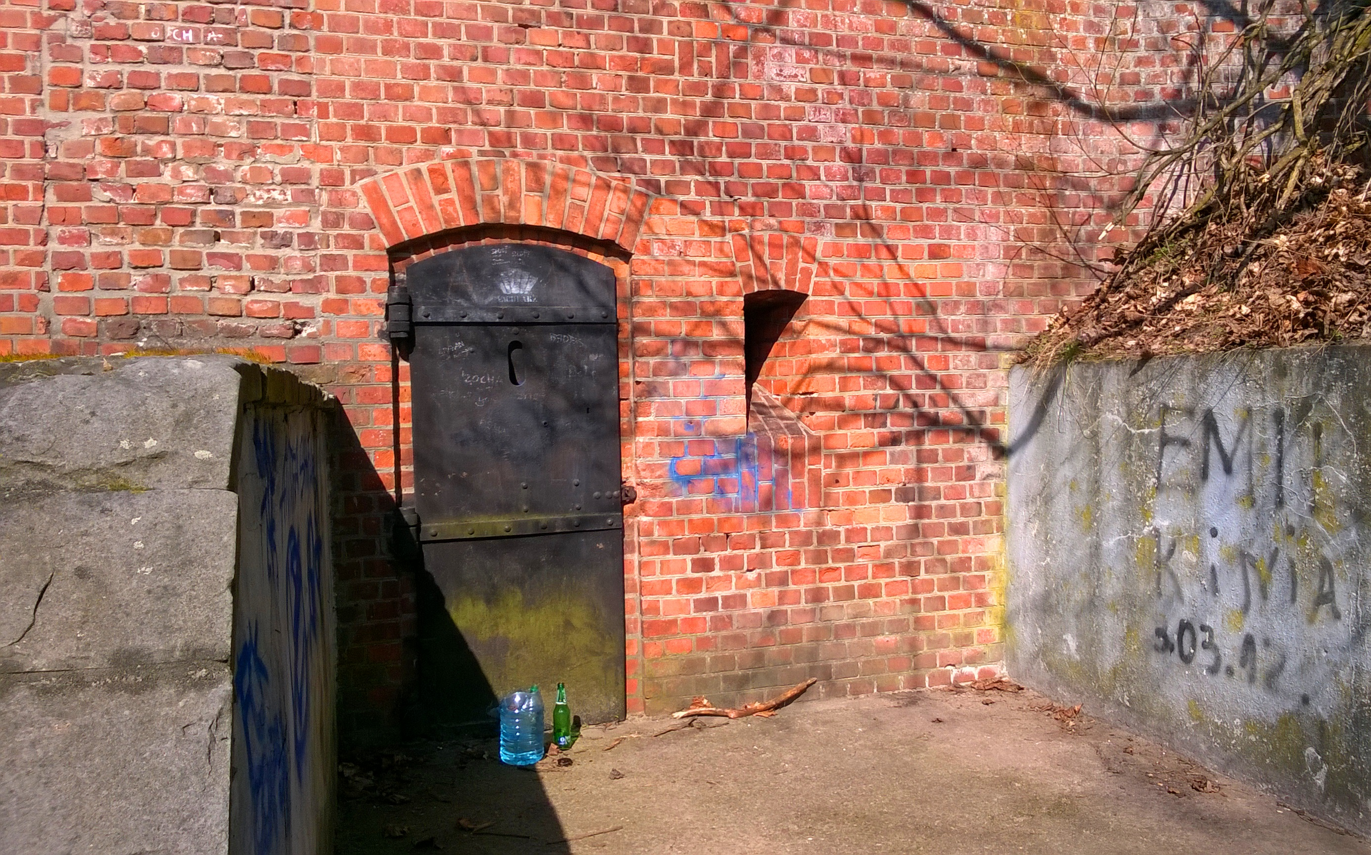 Fort VII Twierdzy Toruń9